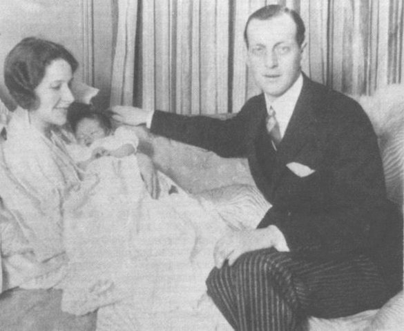 Великий князь Дмитрий Павлович